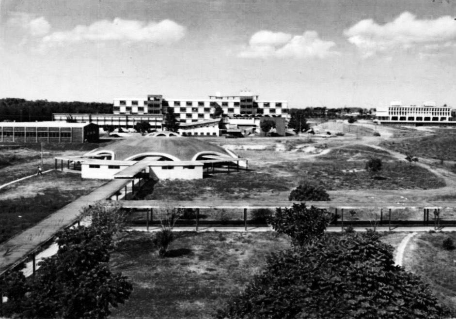 Campus Central de la Universidad de San Carlos reciéb estrenado en 1956. Se obseva el aula magna (iglú), la Facultad de Ingeniería y la Rectoría.